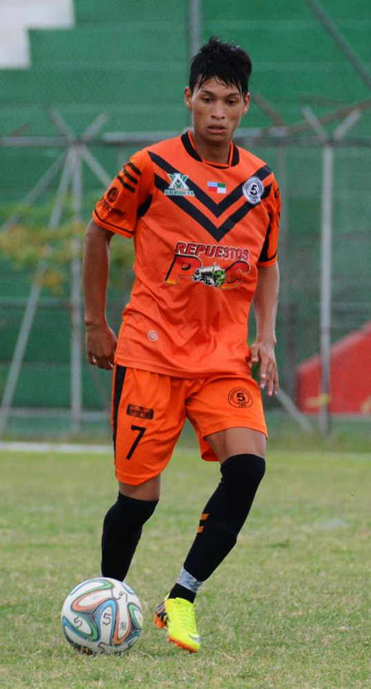 Cristian Romero jugando para 5 de Julio en el 2014